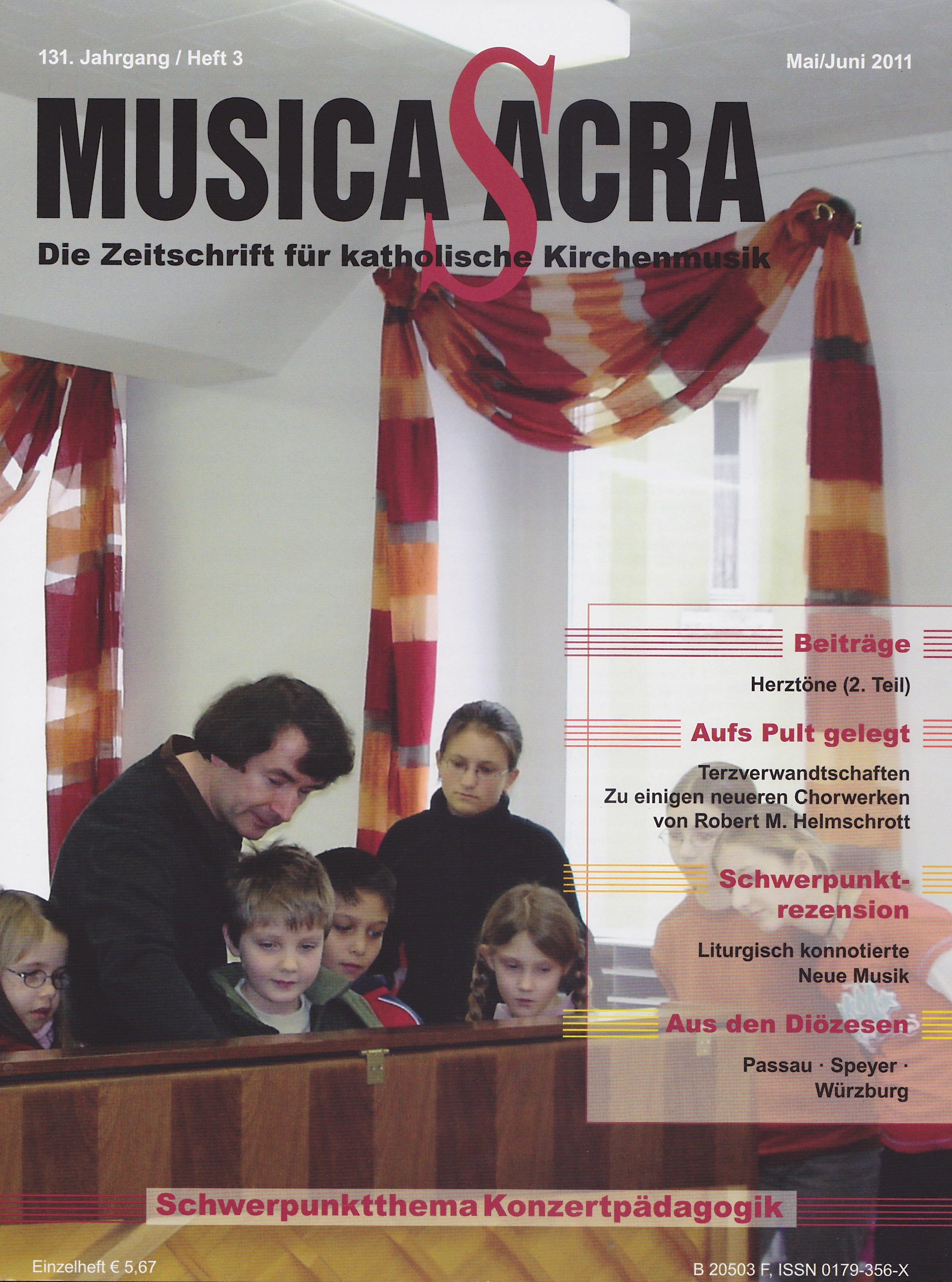 Ludger Stühlmeyer auf dem Titelblatt der Zeitschrift "Musica sacra", 131. Jahrgang, Heft 3, Mai 2011. Schwerpunktthema Konzertpädagogik.